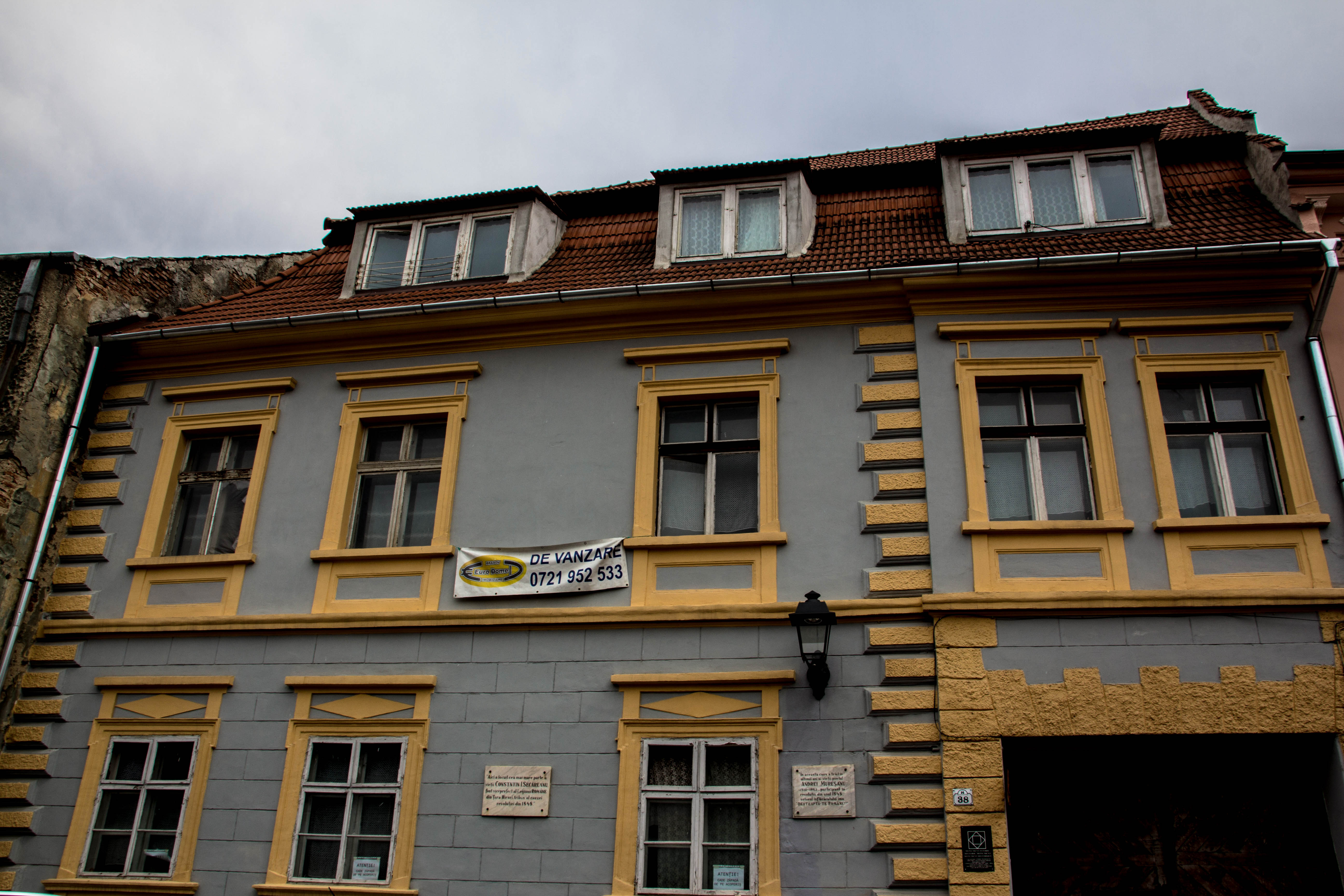 Casa Andrei Mureșianu și Constantin Secăreanu